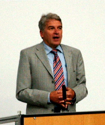 Prof. Dr. Dr. h. c. Manfred Broy bei der Feier zum 80. Geburtstag von Friedrich Ludwig Bauer.